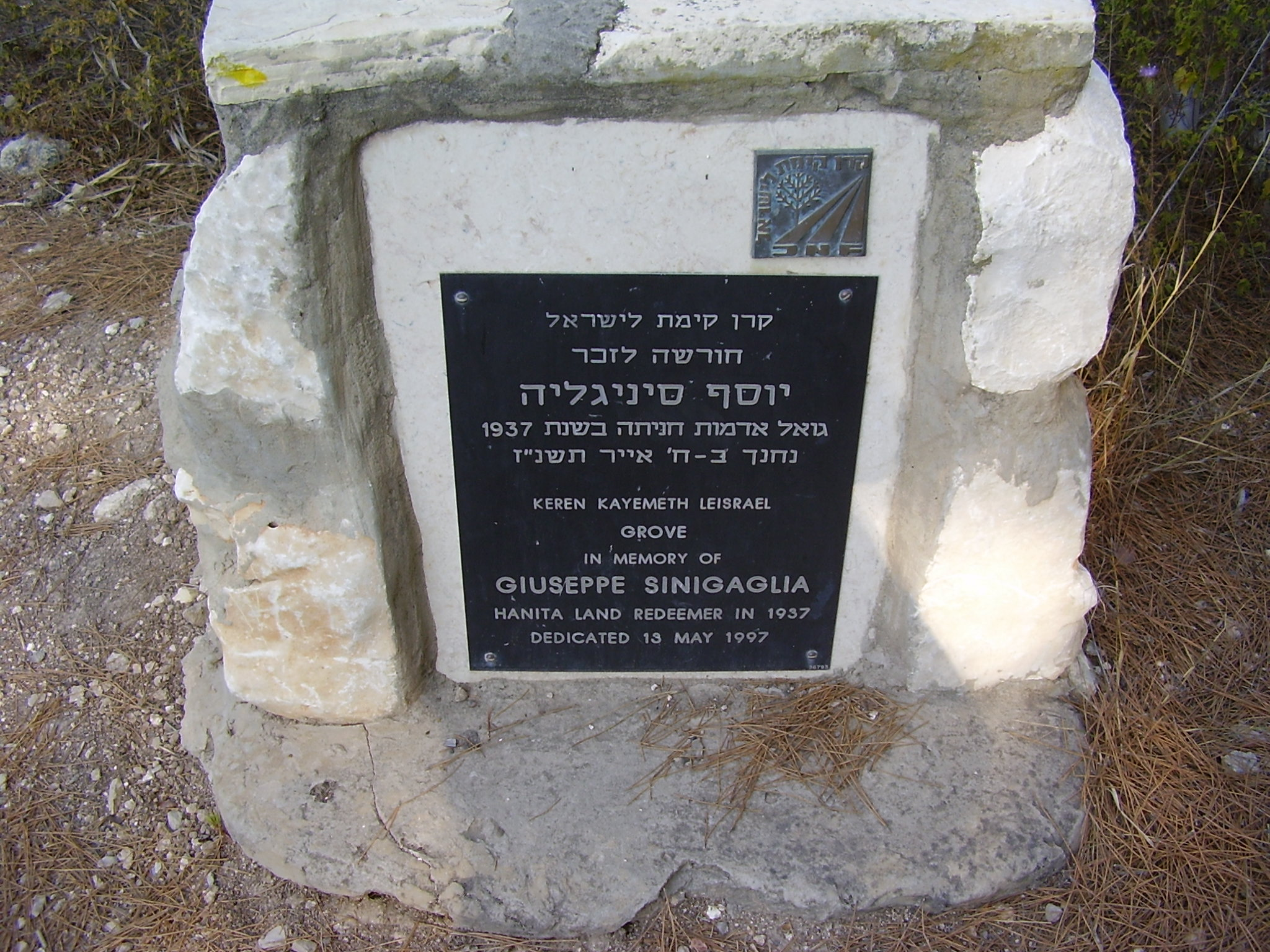 אנדרטה בחורשה על של יוסף סיניגליה ביער חניתה